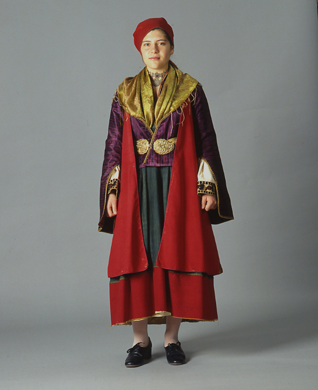 Φορεσιά από το Λεωνίδιο Κυνουρίας. Συλλογή Πελοποννησιακού Λαογραφικού Ιδρύματος, Ναύπλιο